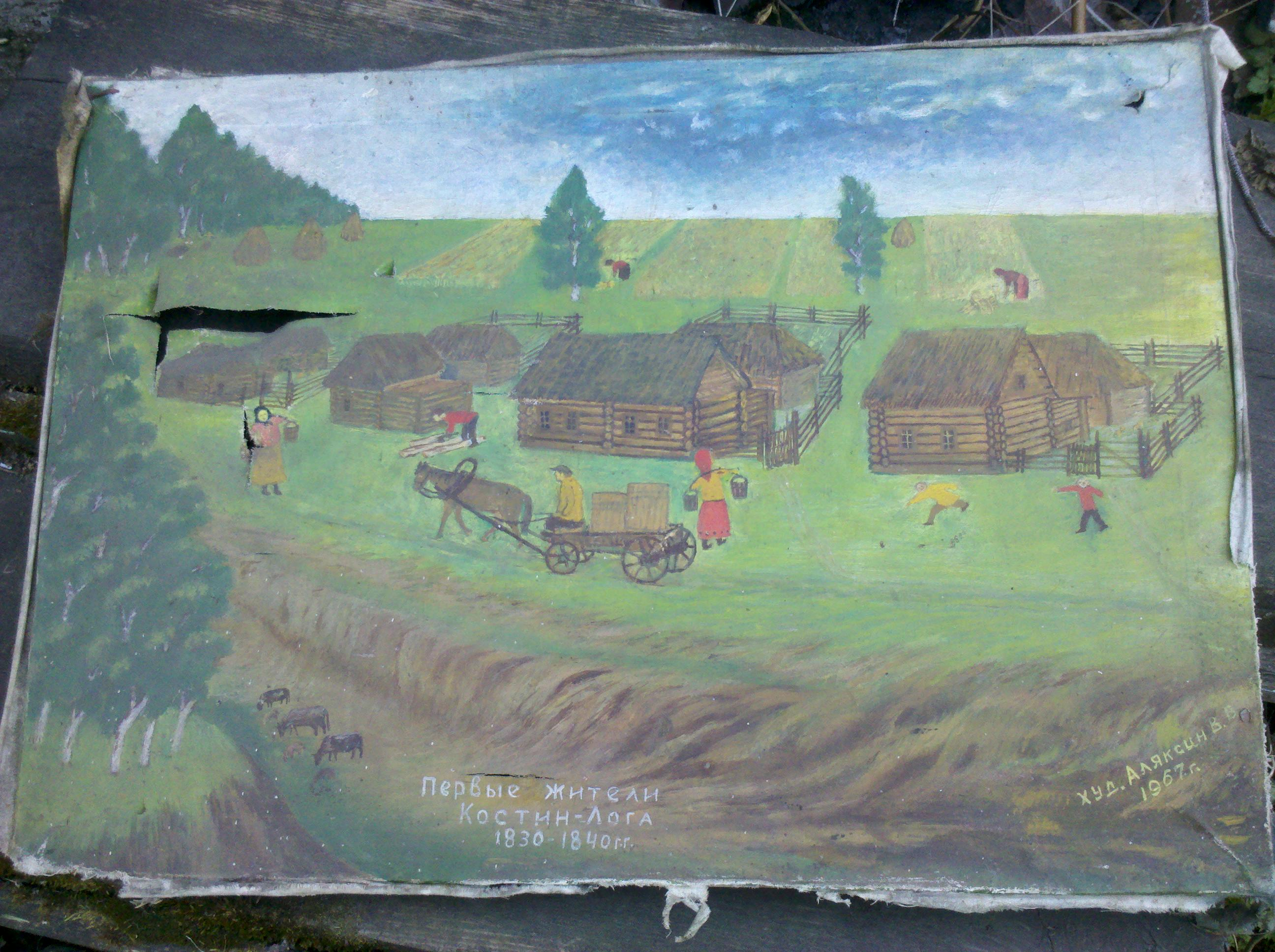 с. Костин Лог картина, худ. Аляксин В. В. 1967г.